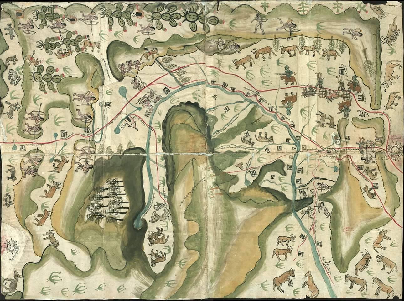 Primera descripción de la geografía de la zona Centro-Norte de México elaborado a fines del siglo XIX. El original se encuentra en el Museo de Historia de Madrid en España